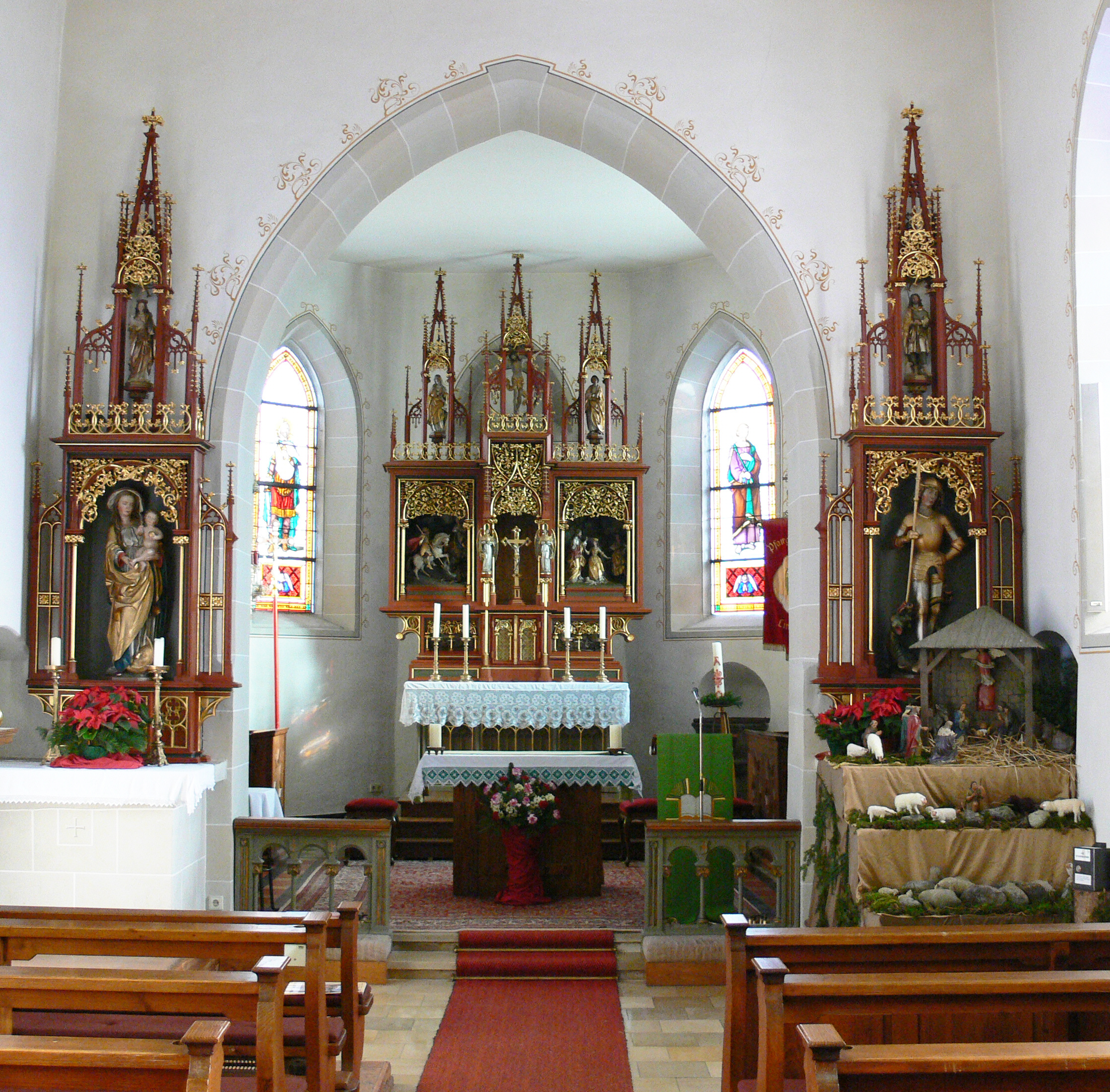 Limpach, Gemeinde Deggenhausertal: Pfarrkirche St. Georg, Hochaltar (Mitte), Marienaltar (links) und Georgsaltar (rechts) von Theodor Schnell d. J., um 1900